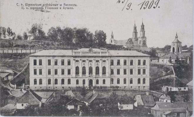 Бучач_гімназія_бл. 1909 C. k. gimnazyum państwowe w Buczaczu C. k. deržavna gimnaziâ v Bučači.